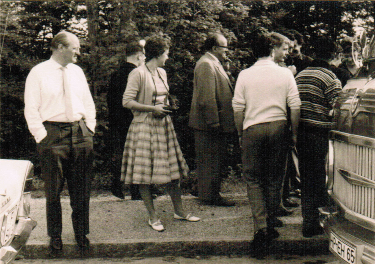 Johannes Krahn (links) und ein nicht identifizierter Kollege (Mitte) mit Studenten auf einer Studienfahrt.